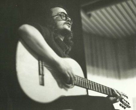 Ein Bild vom Günther Wölfle aus den 80iger Jahren